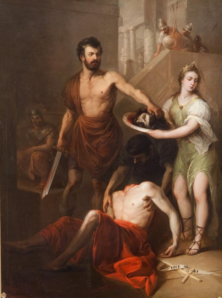 La obra representa el momento en que la cabeza del profeta San Juan Bautista, que fue decapitado por orden del rey Herodes Antipas, fue entregada en una bandeja a Salomé, quien a continuación, y según se refiere en los Santos Evangelios, la entregó a su madre, la reina Herodías, siendo los dicípulos de Juan el Bautista los que dieron sepultura al resto de su cuerpo.